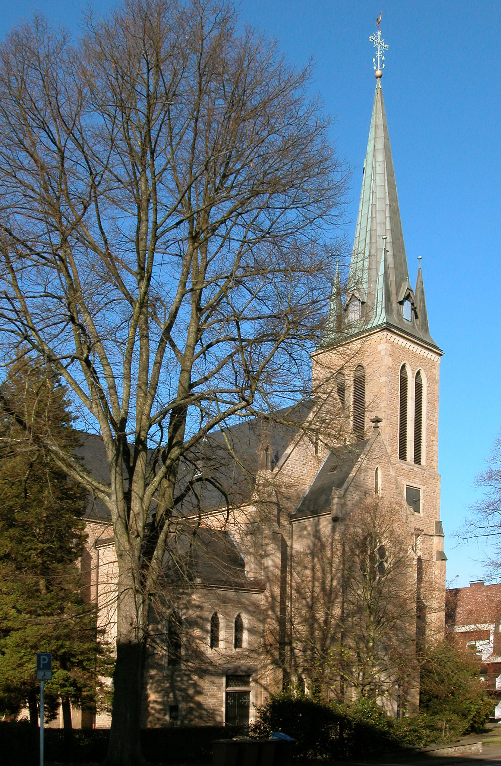 Ev. Kirche in Mülheim-Broich Standort 51°25′23.76″N 6°52′12.90″E / 51.4232667°N 6.87025°E